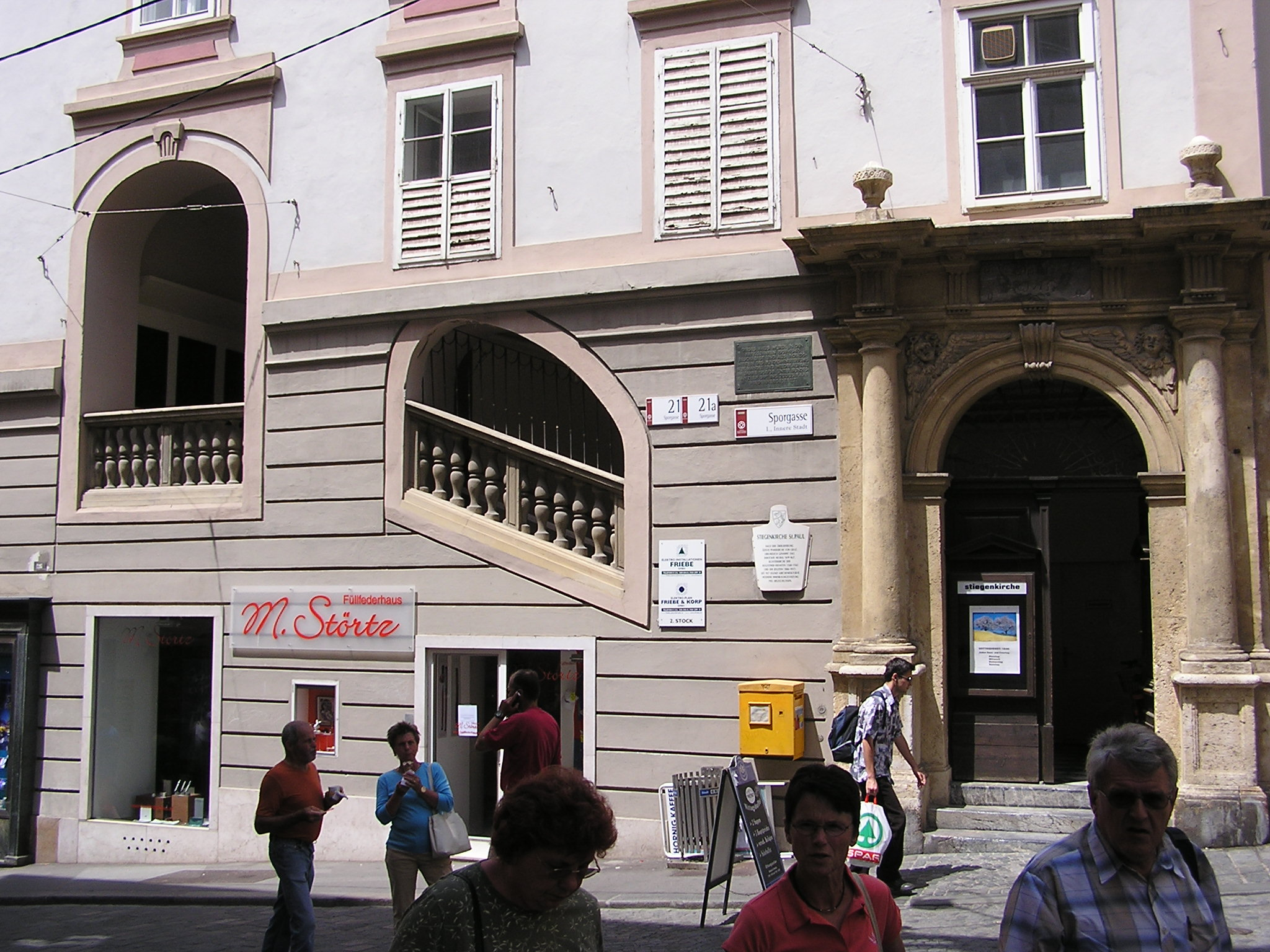 Eingang der Stiegenkirche